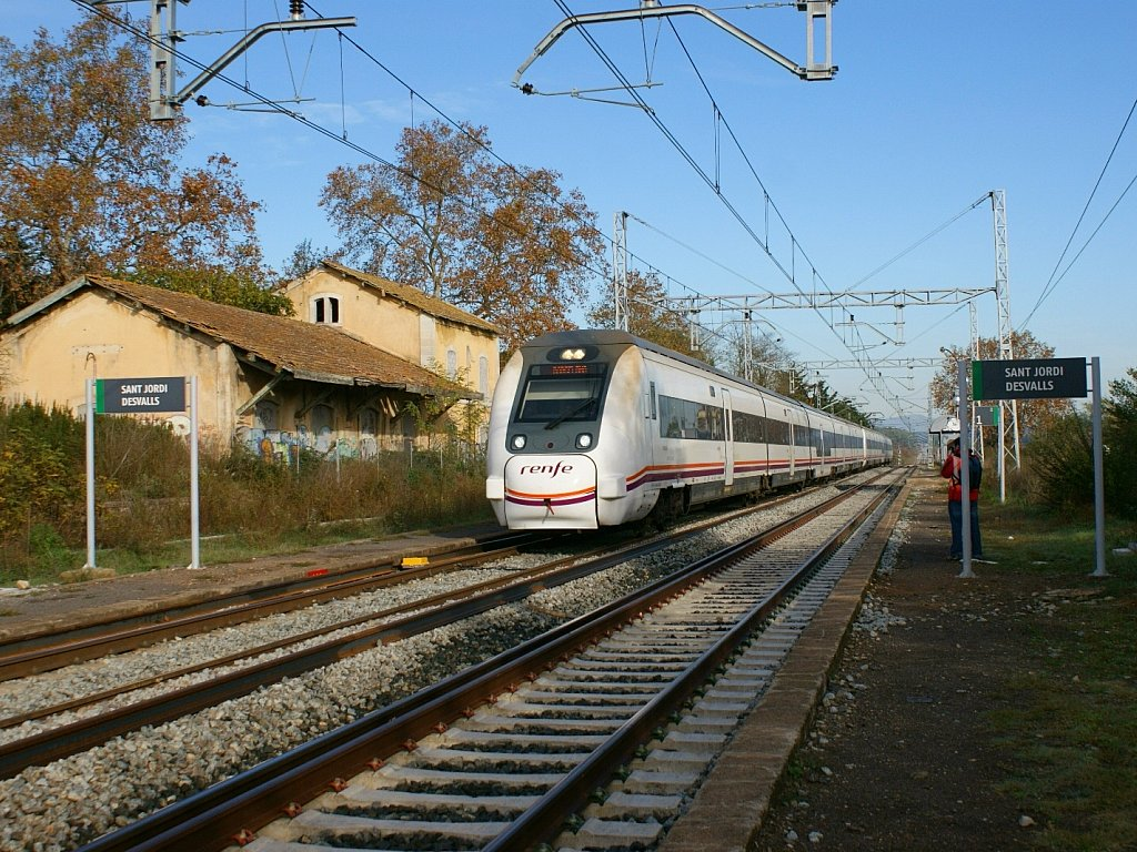 Parella de 449 per la R2 en direcció Barcelona al seu pas per Sant Jordi Desvalls. Pareja de 449 por la R2 en dirección Barcelona a su paso por Sant Jordi Desvalls.